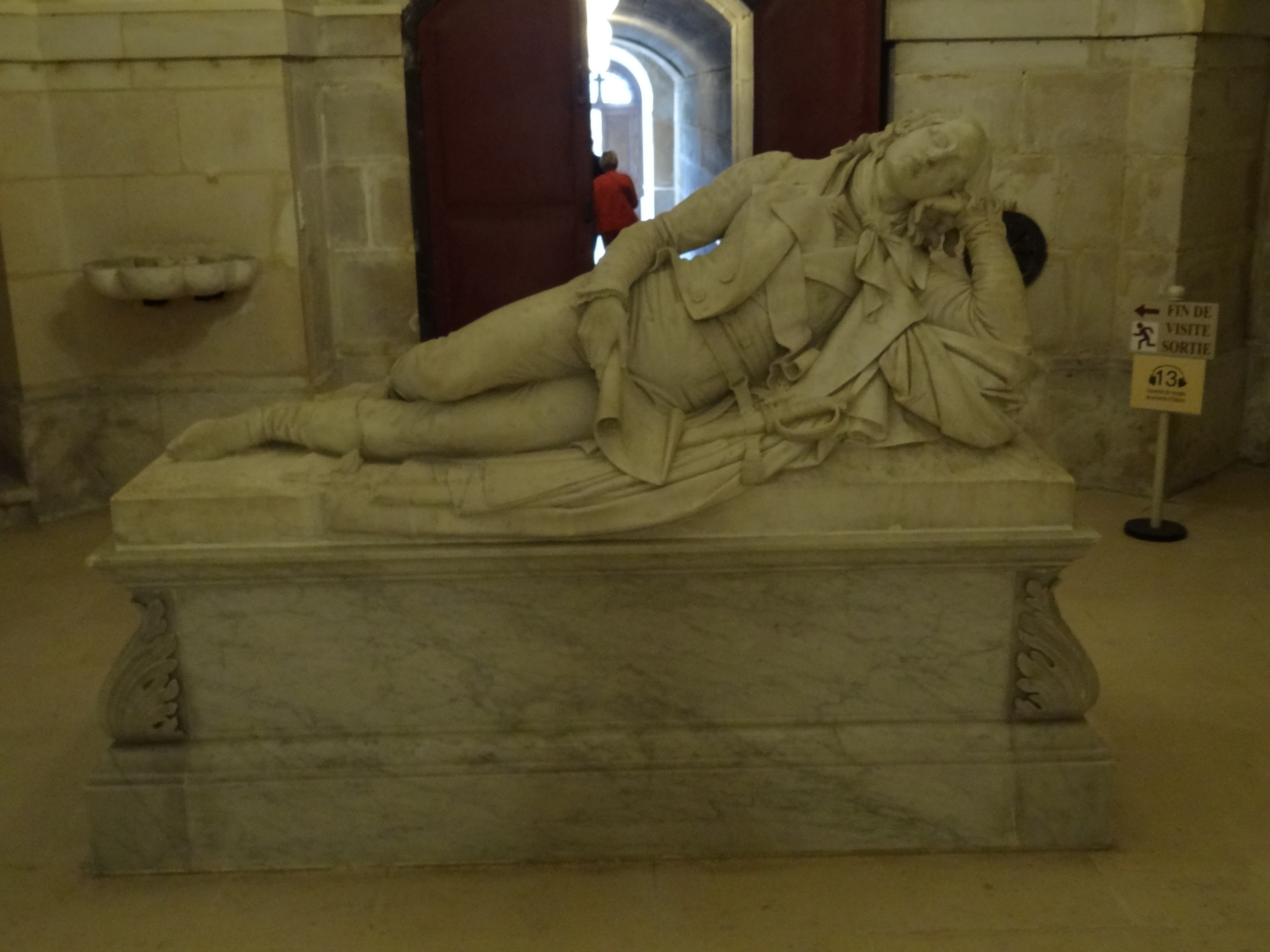 Le cénotaphe du prince Louis-Charles d'Orléans, comte de Beaujolais, dans la galerie occidentale de la crypte de la chapelle royale Saint-Louis à Dreux.